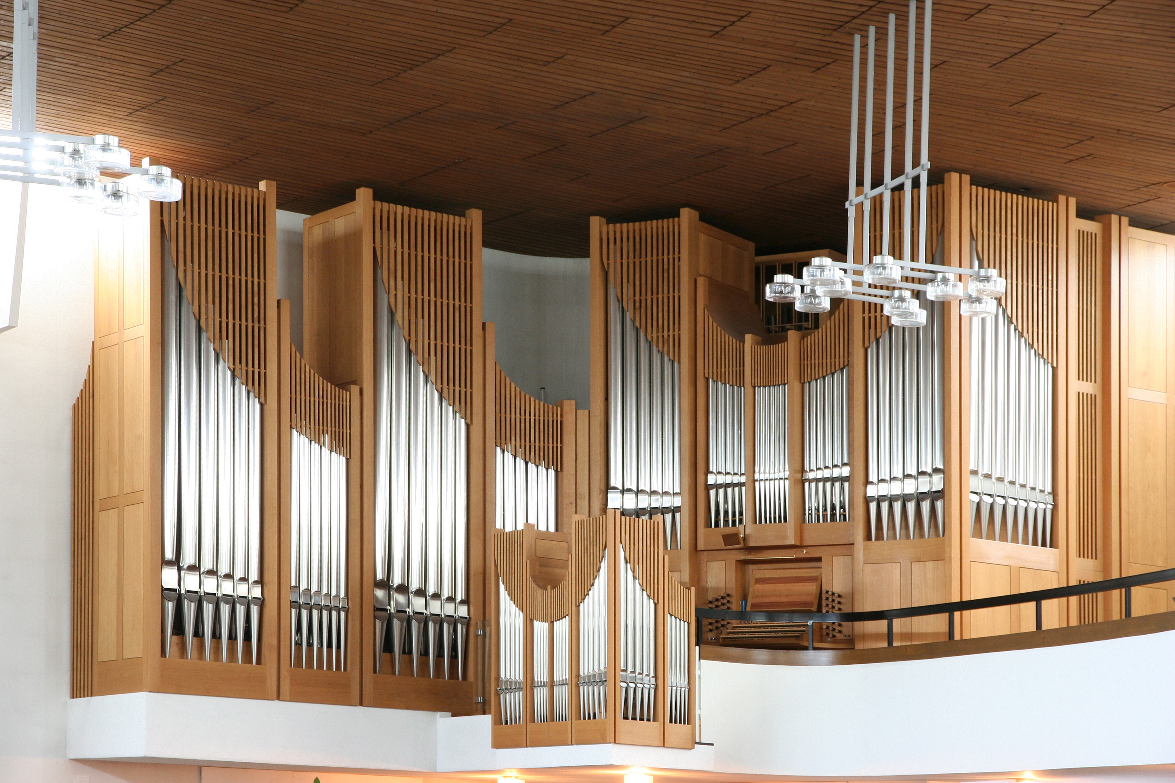 Römisch-katholische Kirche St. Meinrad Pfäffikon SZ, Orgel